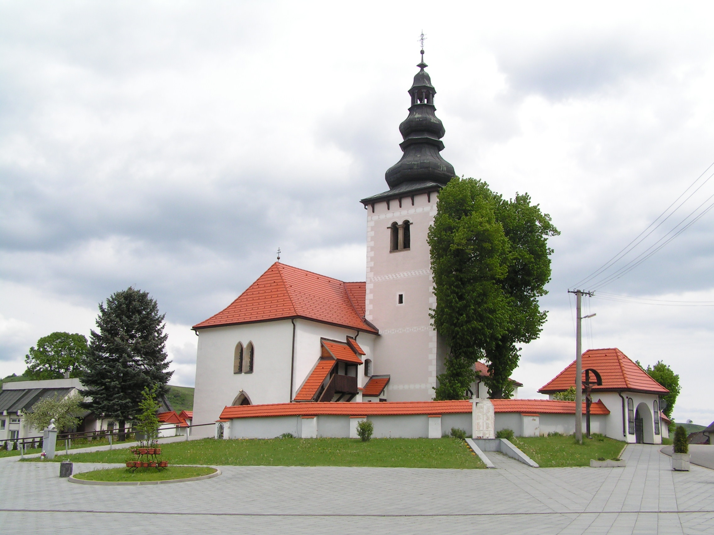 Pohled na kostel, Liptovské Sliače, Slovenská republika